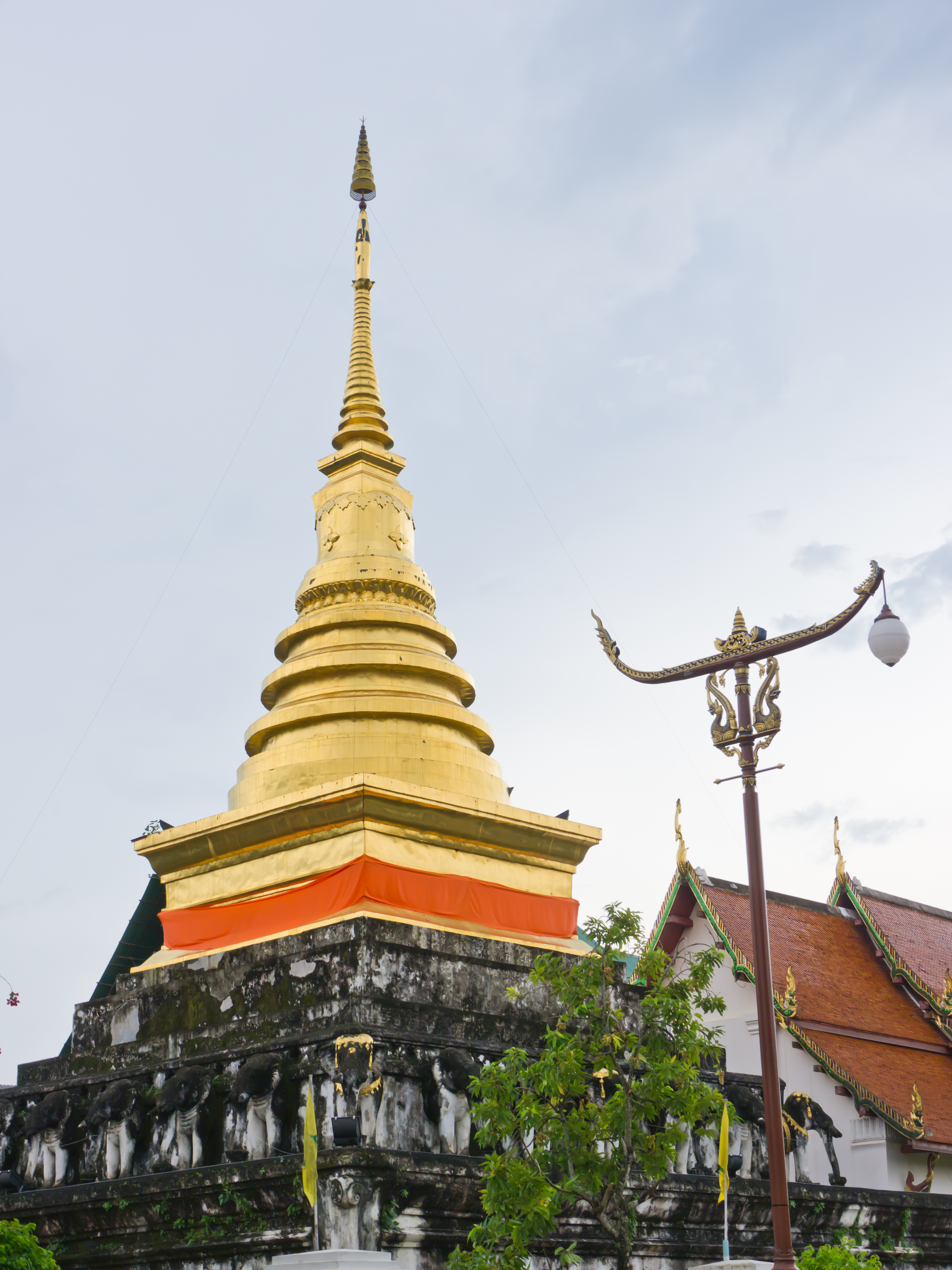 วัดพระธาตุช้างค้ำวรวิหาร